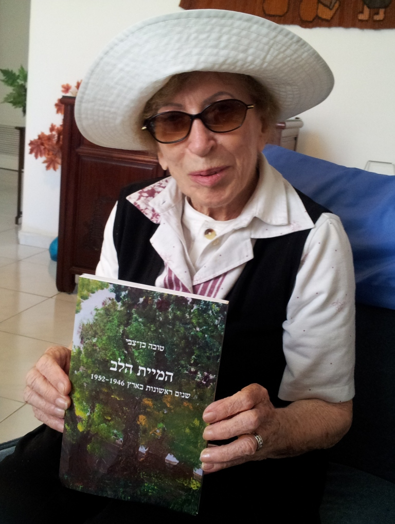 הזמרת טובה בן צבי מציגה את ספרה האחרון "המיית הלב" בהוצאת צבעונים 2013